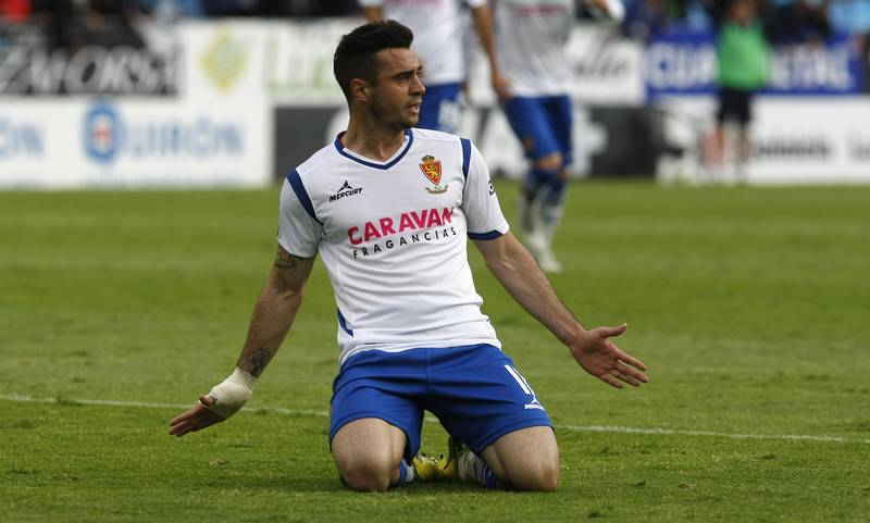 jaime festejando